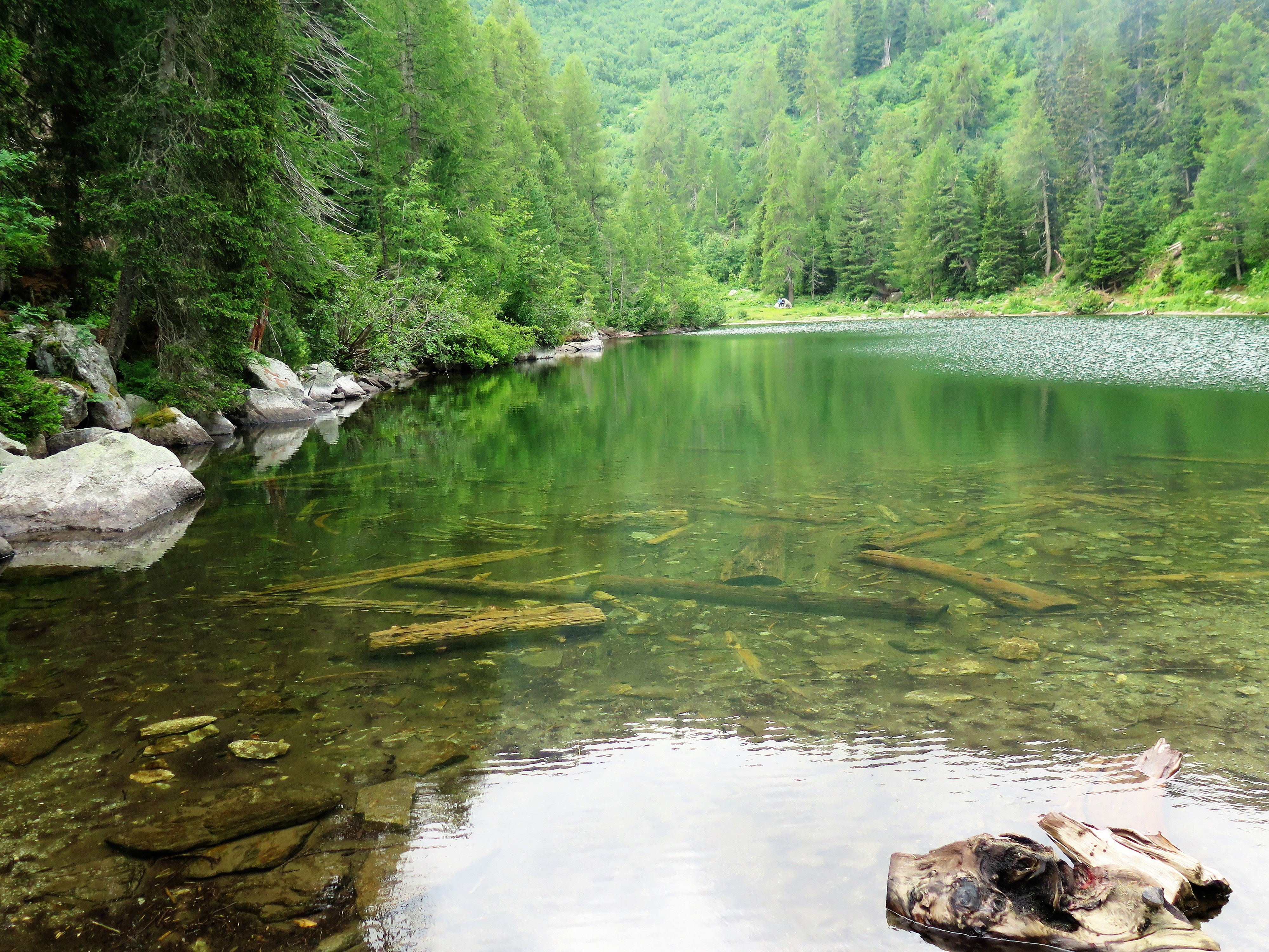 Lägh da Bitabergh (Bitabergasee) bei Maloja